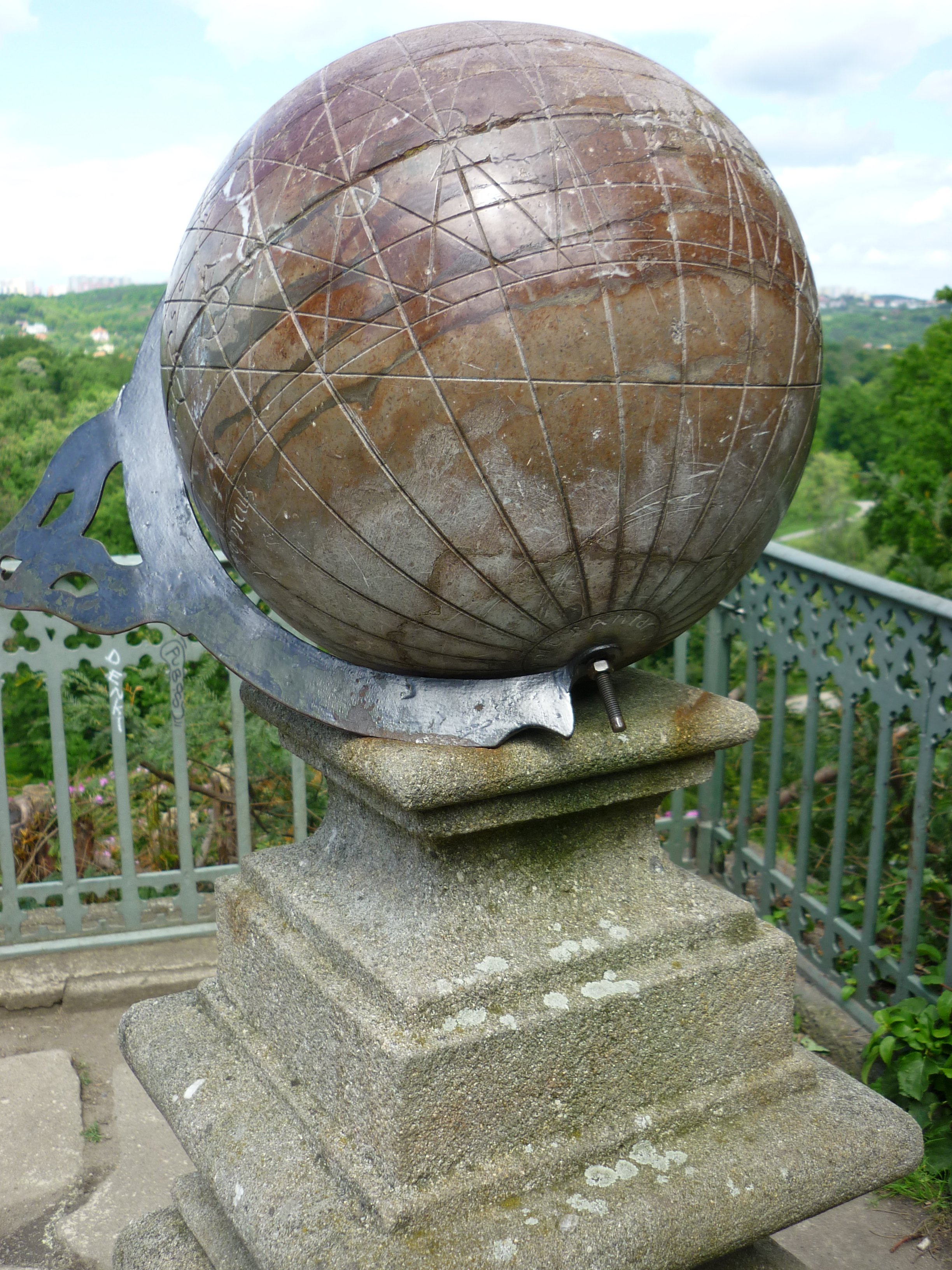 Sluneční hodiny tvaru "globus"